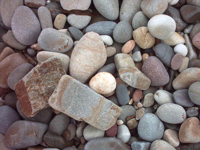 Lieu : Cotentin (Normandie/France) - plage Galets